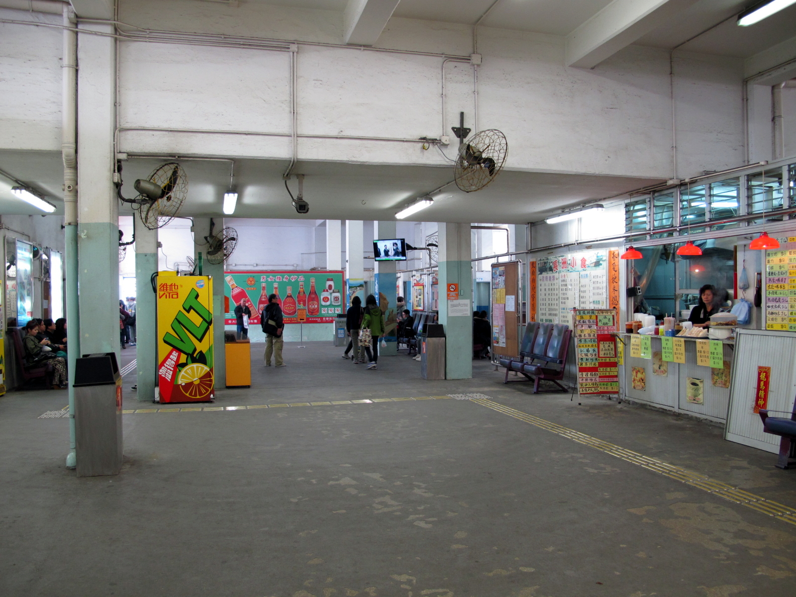 Cheung Chau Ferry Pier Interior